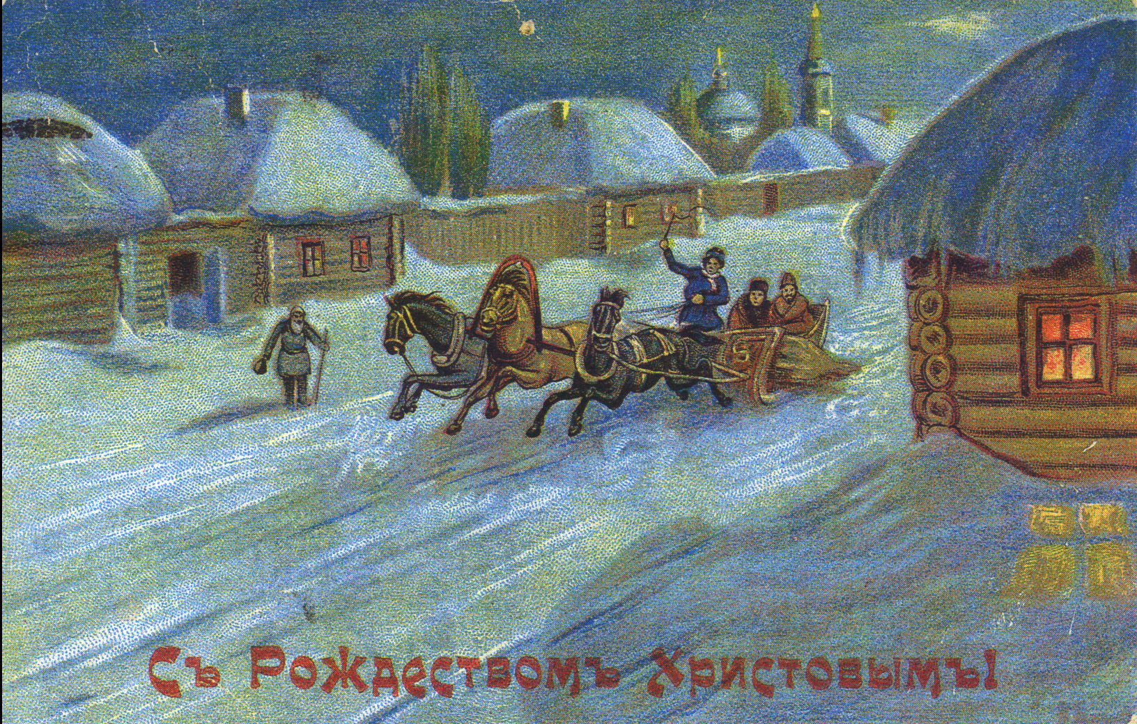 Рождественская дореволюционная открытка